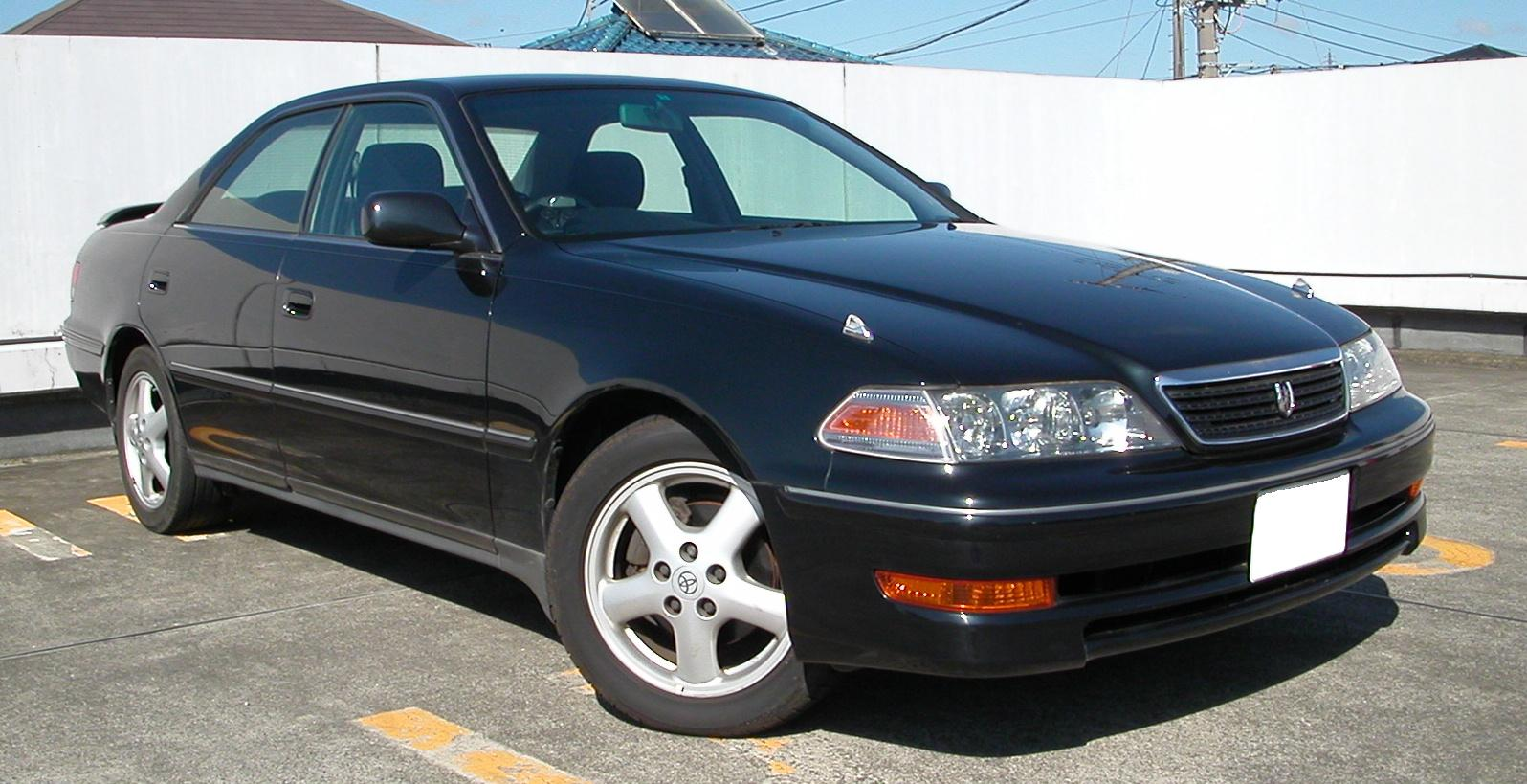 jzx100